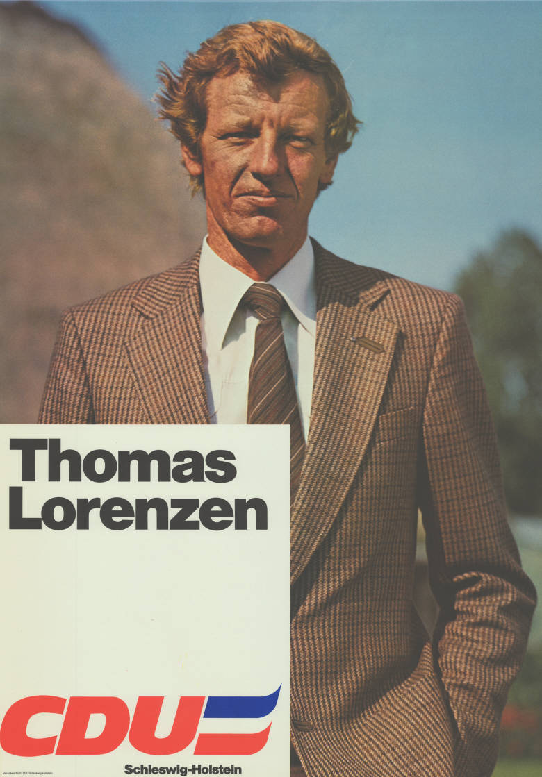 Thomas Lorenzen CDU Schleswig-Holstein Abbildung: Foto Plakatart: Kandidaten-/Personenplakat mit Porträt Auftraggeber: Verantw.: CDU Schleswig-Holstein Objekt-Signatur: 10-012 : 430 Bestand: Landtagswahlplakate Schleswig-Holstein (10-012) GliederungBestand10-18: Landtagswahlplakate Schleswig-Holstein (10-012) » Landtagswahl am 29.4.1979 » Ankündigungsplakate Lizenz: KAS/ACDP 10-012 : 430 CC-BY-SA 3.0 DE